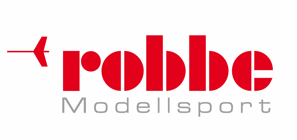 Logo von Robbe Modellsport